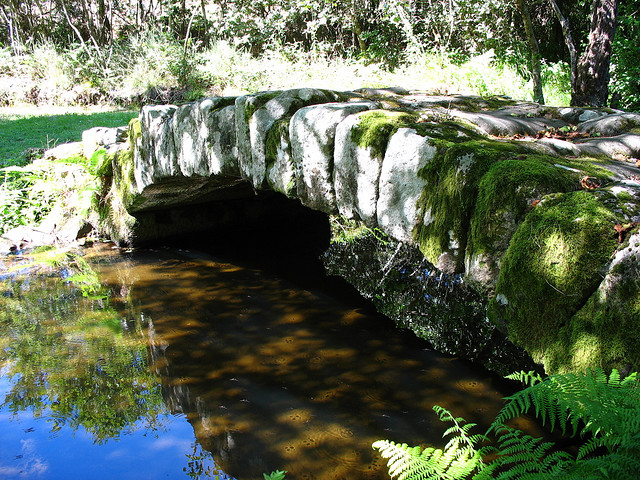 Ponte de Rua de Francos